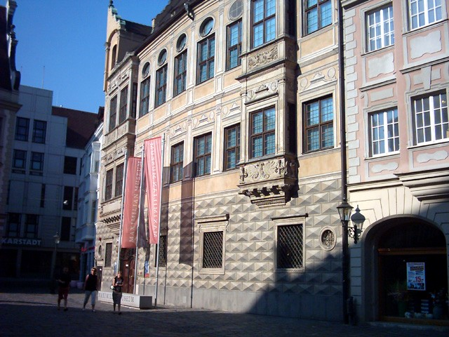 Augsburg: Maximilianmuseum Bildautor: Peter Bubenik - Aufnahmedatum: 03.09.2004